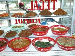 Basa Jawa: Warteg sing apik dhewe